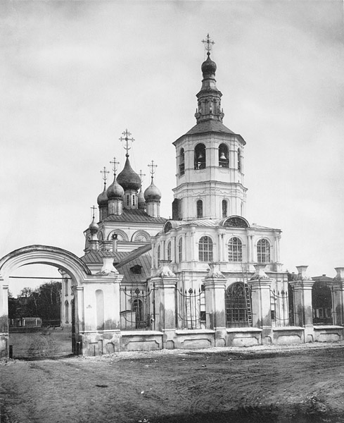 Храм Троицы Живоначальной в Кожевниках (Москва, 2-й Кожевнический переулок, 4/6).